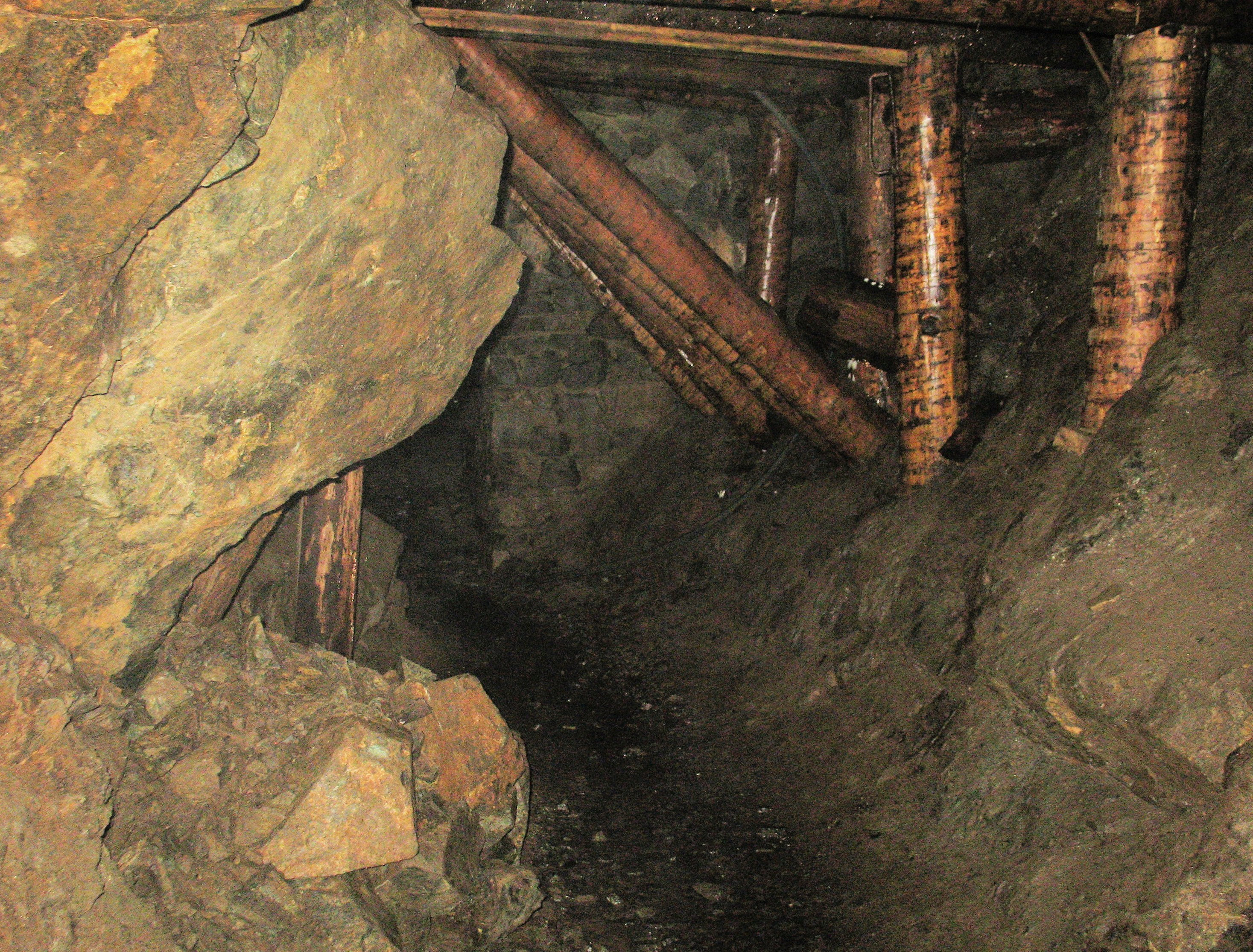 Vnitřní část štoly